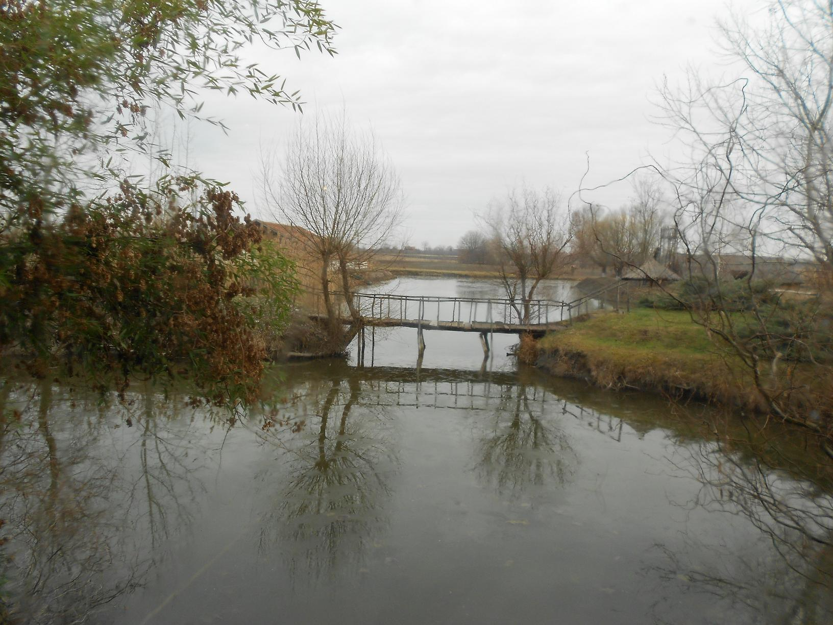 Драган Цветковић сопствена слика Палић 2012